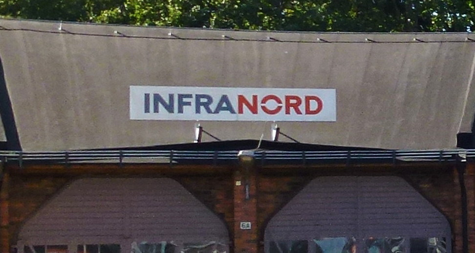 Lokstallet Sundbyberg